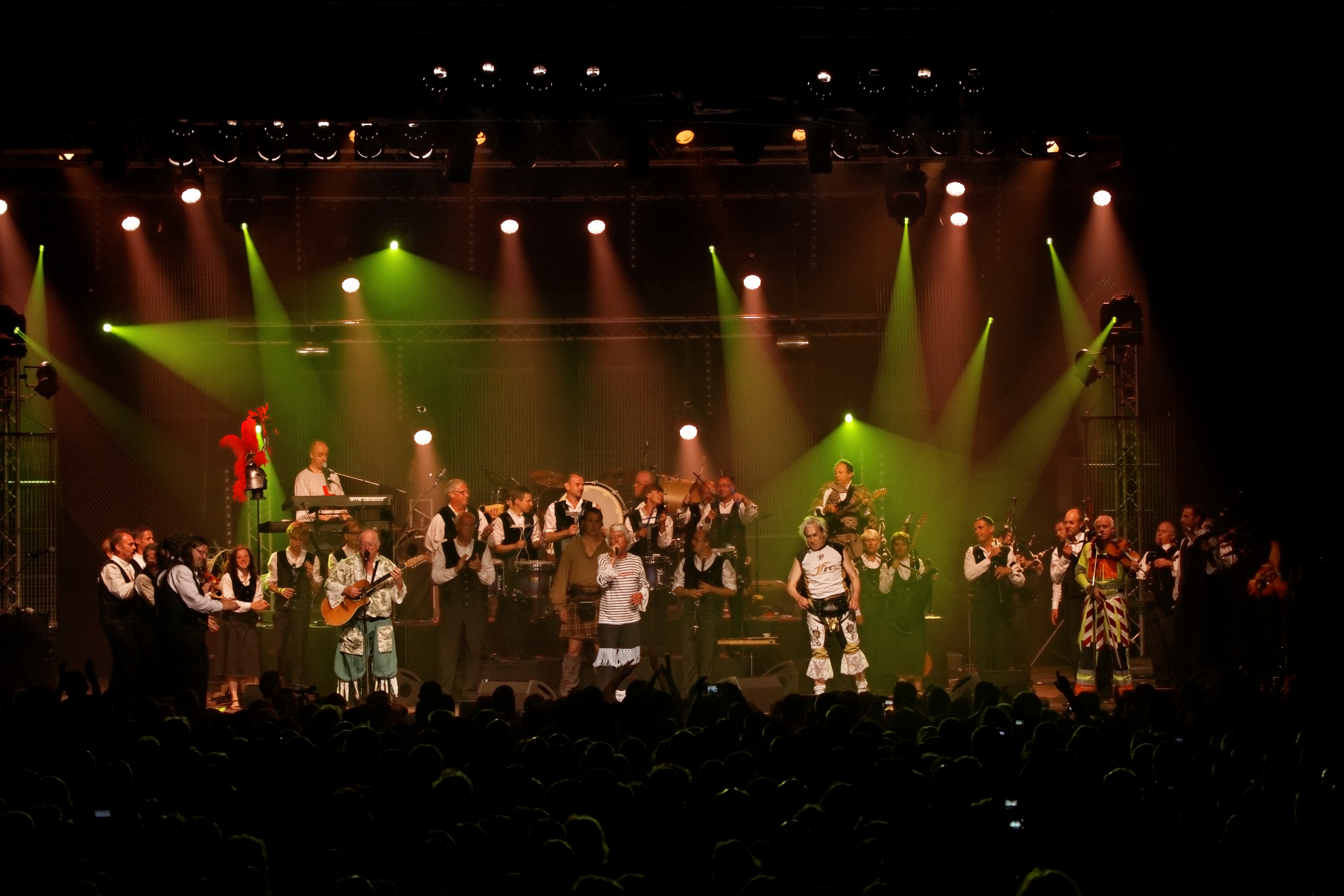 Tri Yann en concert à l'espace Gradlon lors du festival de Cornouaille 2012. Le bagad Naoned accompagne Tri Yann sur scène.